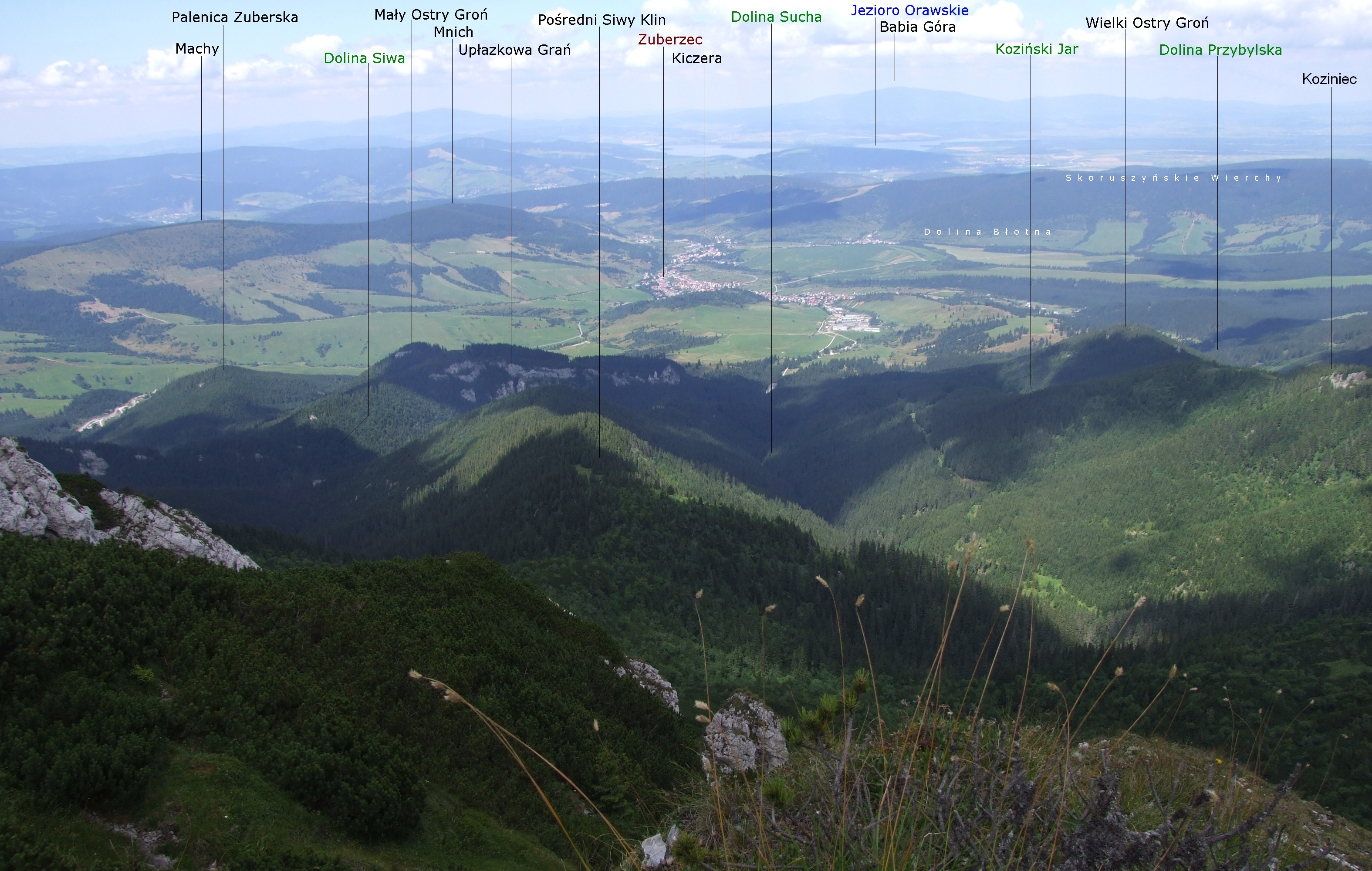 Widok na północną stronę z Siwego Wierchu